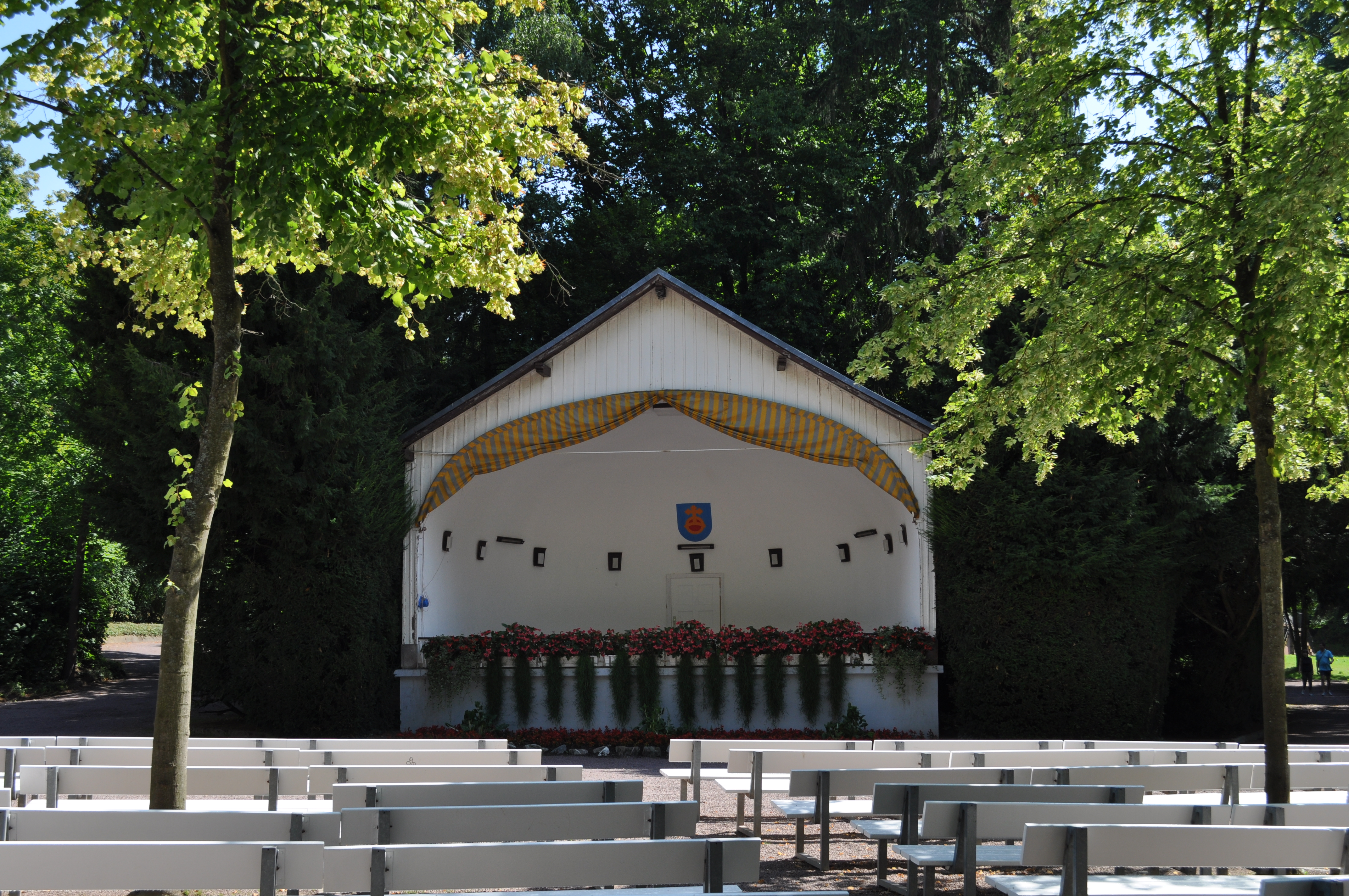 Konzertmuschel im Alten Kurpark, Bad Soden